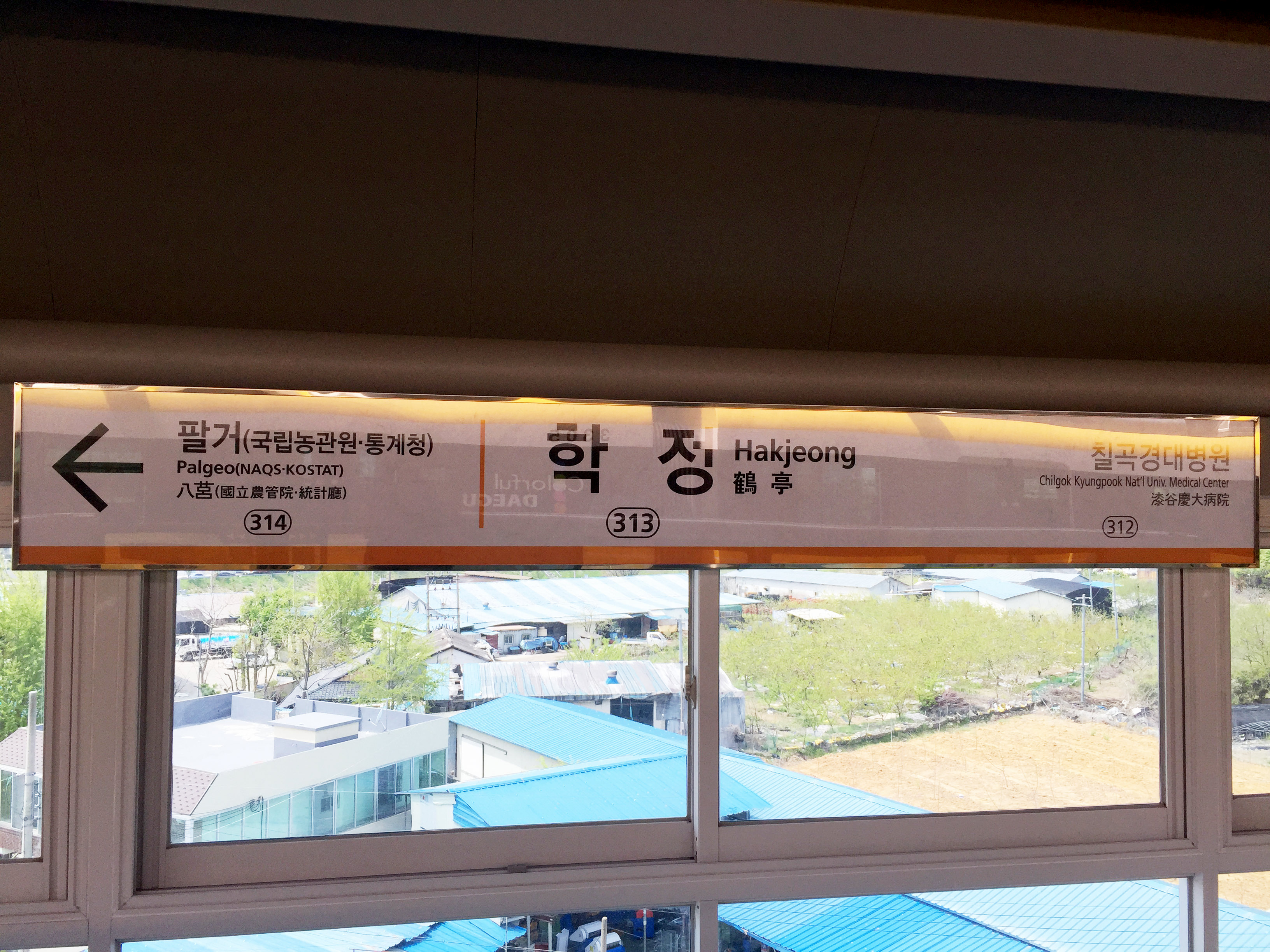 학정역 역명판